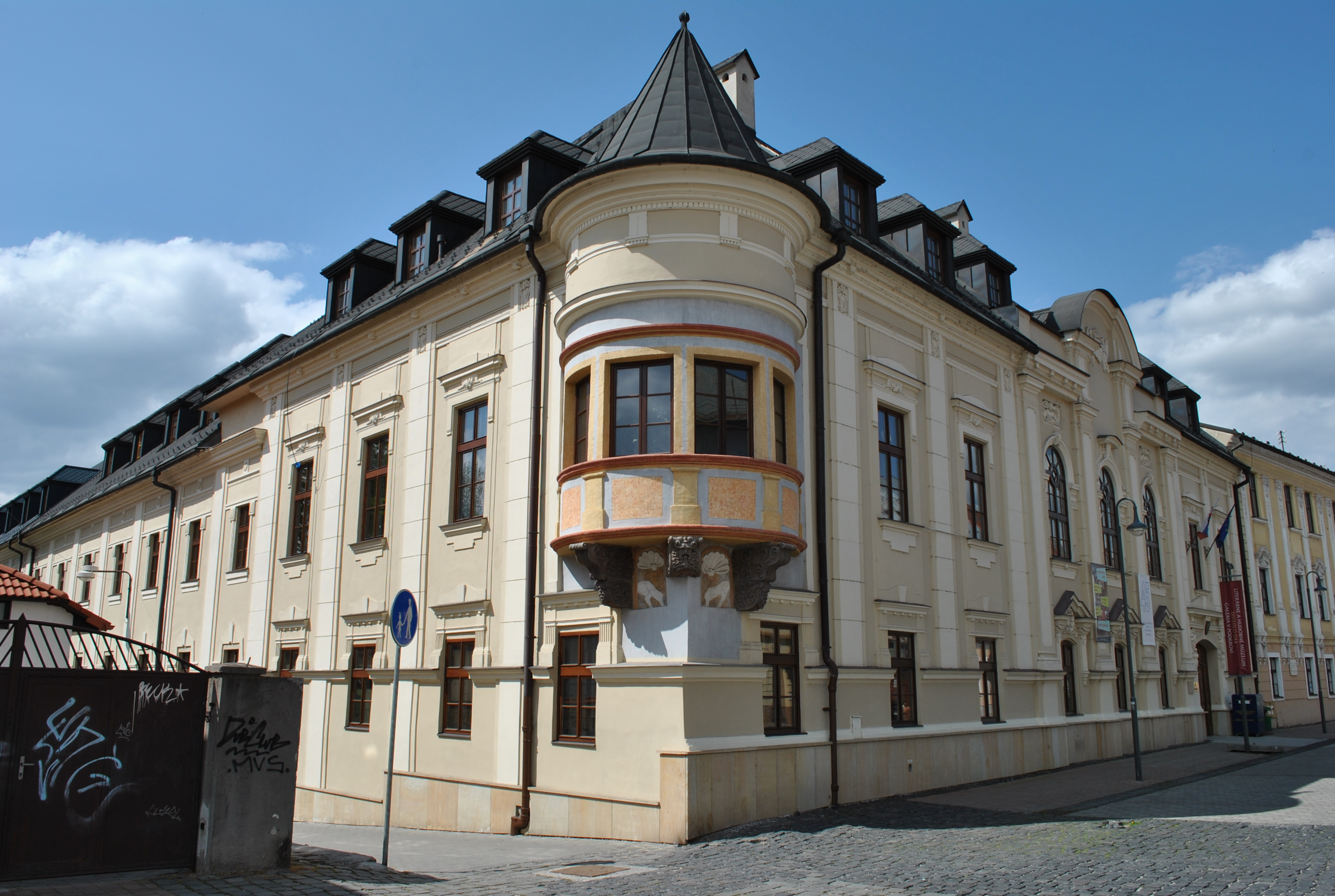 Dom meštiansky